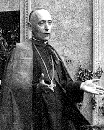 Mindszenty József bíboros 1947-ben